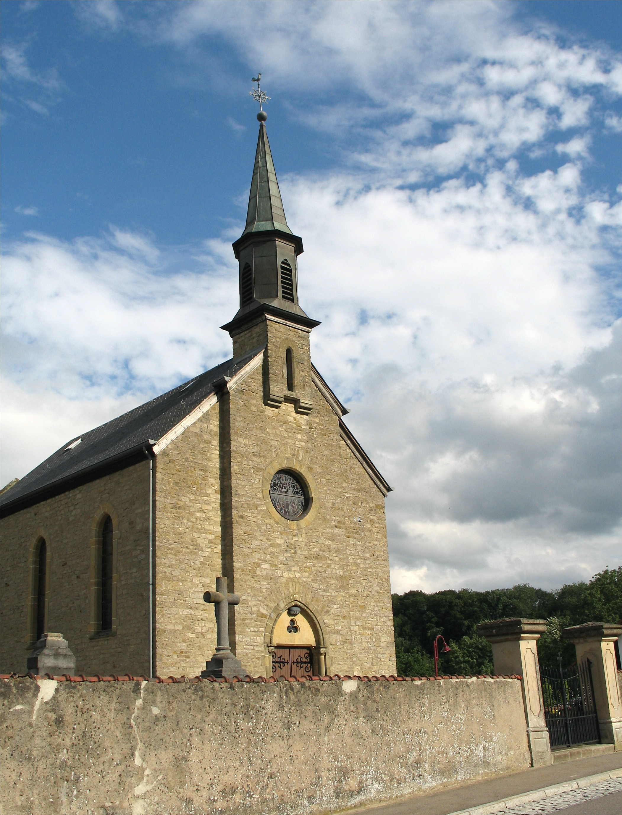 Kierch vun Iernster